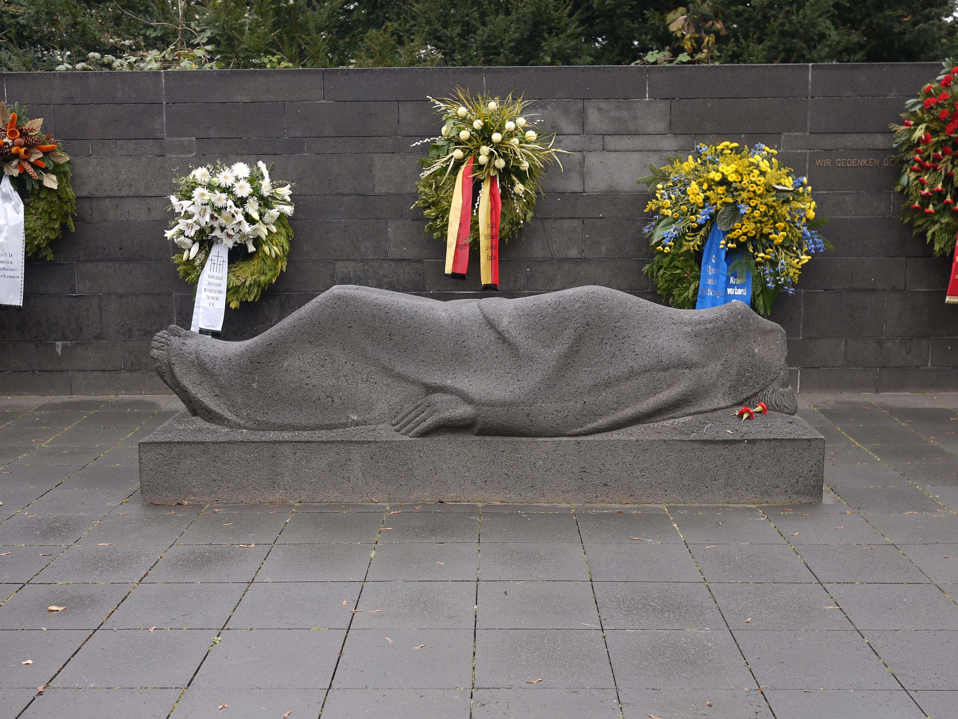 Mahnmal für die Opfer beider Weltkriege von Gerhard Marcks, Mülheim an der Ruhr